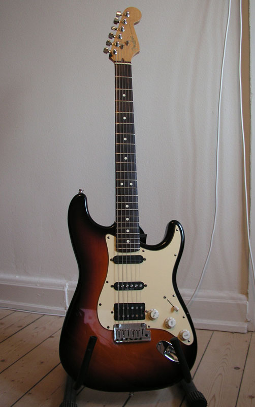 Fender Standard Stratocaster